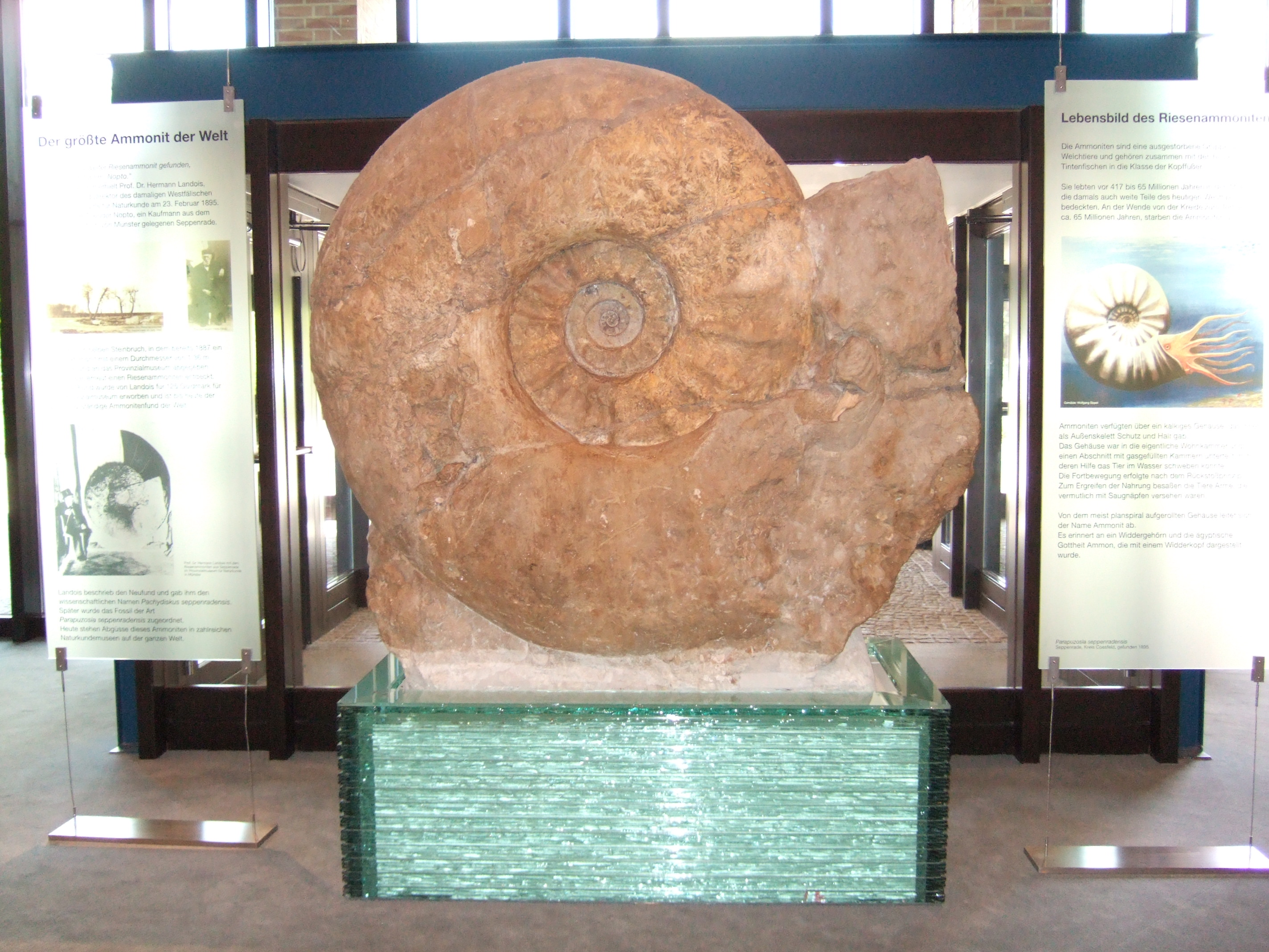 Parapuzosia seppenradensis aus dem Münsterland, mit 174,2 Zentimetern Durchmesser der weltweit größte bekannte Ammonit, steht im LWL-Museum für Naturkunde in Münster.